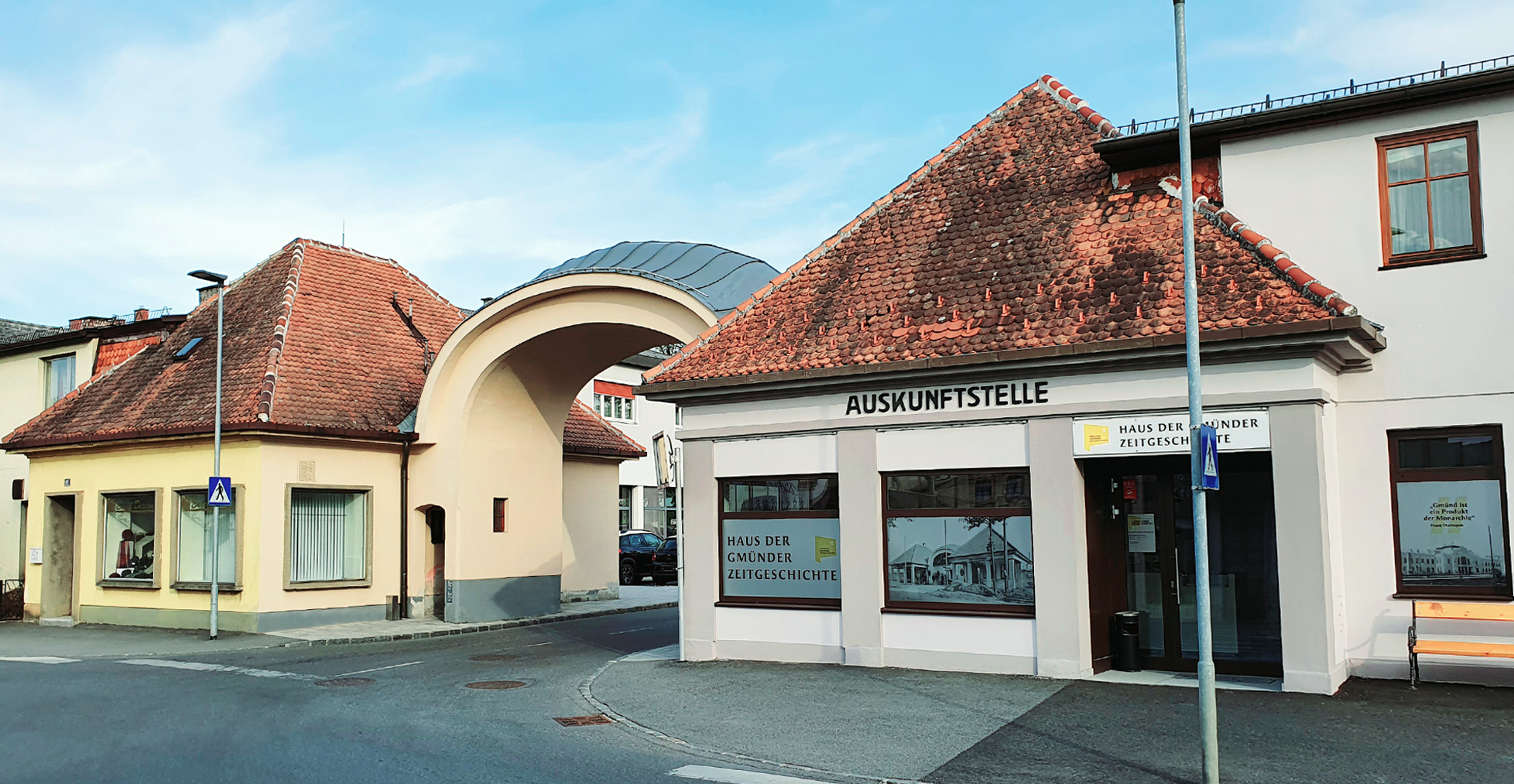 Das "Haus der Gmünder Zeitgeschichte" wurde im Jahr 2019 in der ehemaligen "Auskunftsstelle" des Haupteingangstores des Gmünder Flüchtlingslagers eingerichtet.